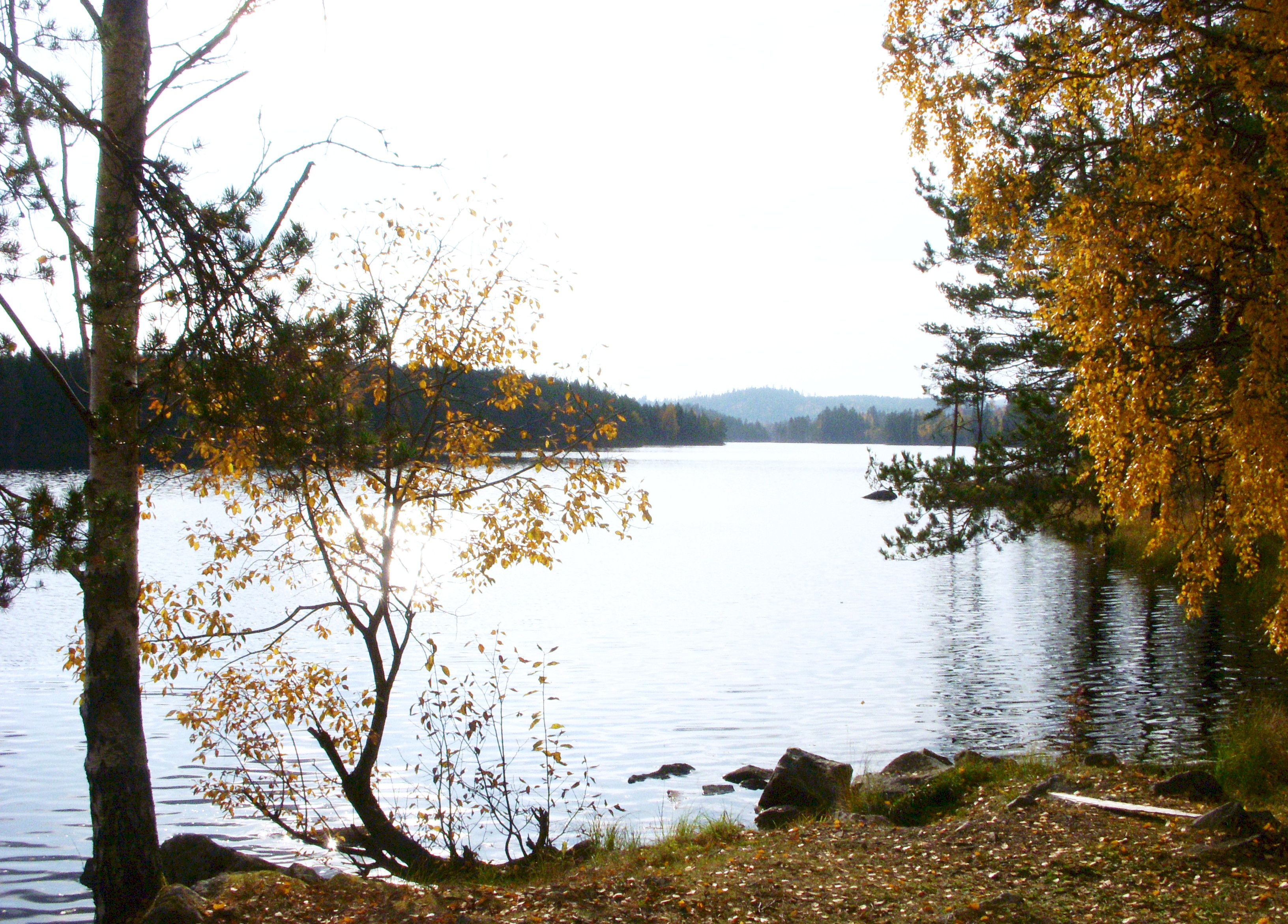 Långsjön är en sjö i Borlänge kommun och Säters kommun i Dalarna